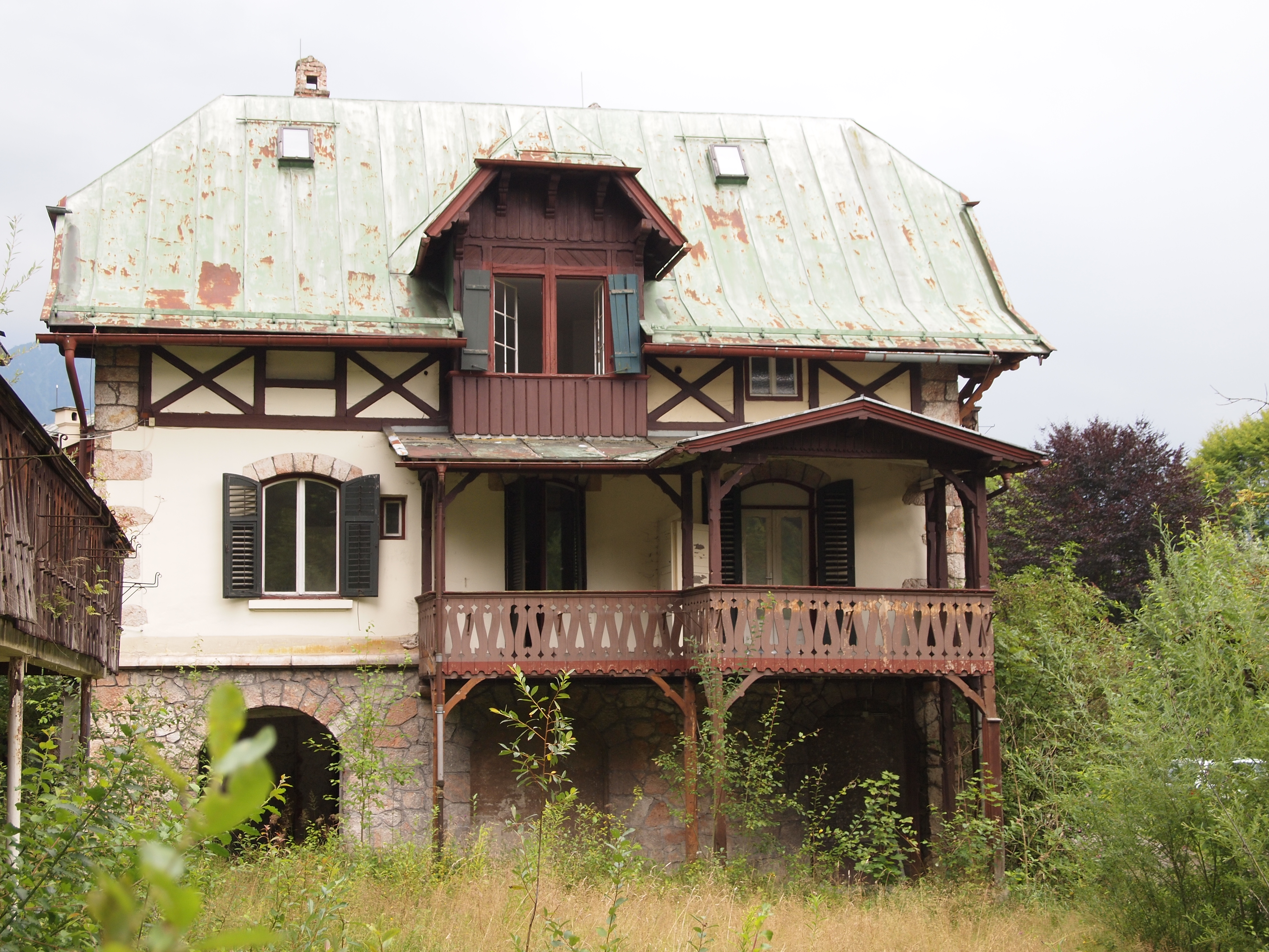 Hotel Geiger, Logierhaus, Seitenansicht